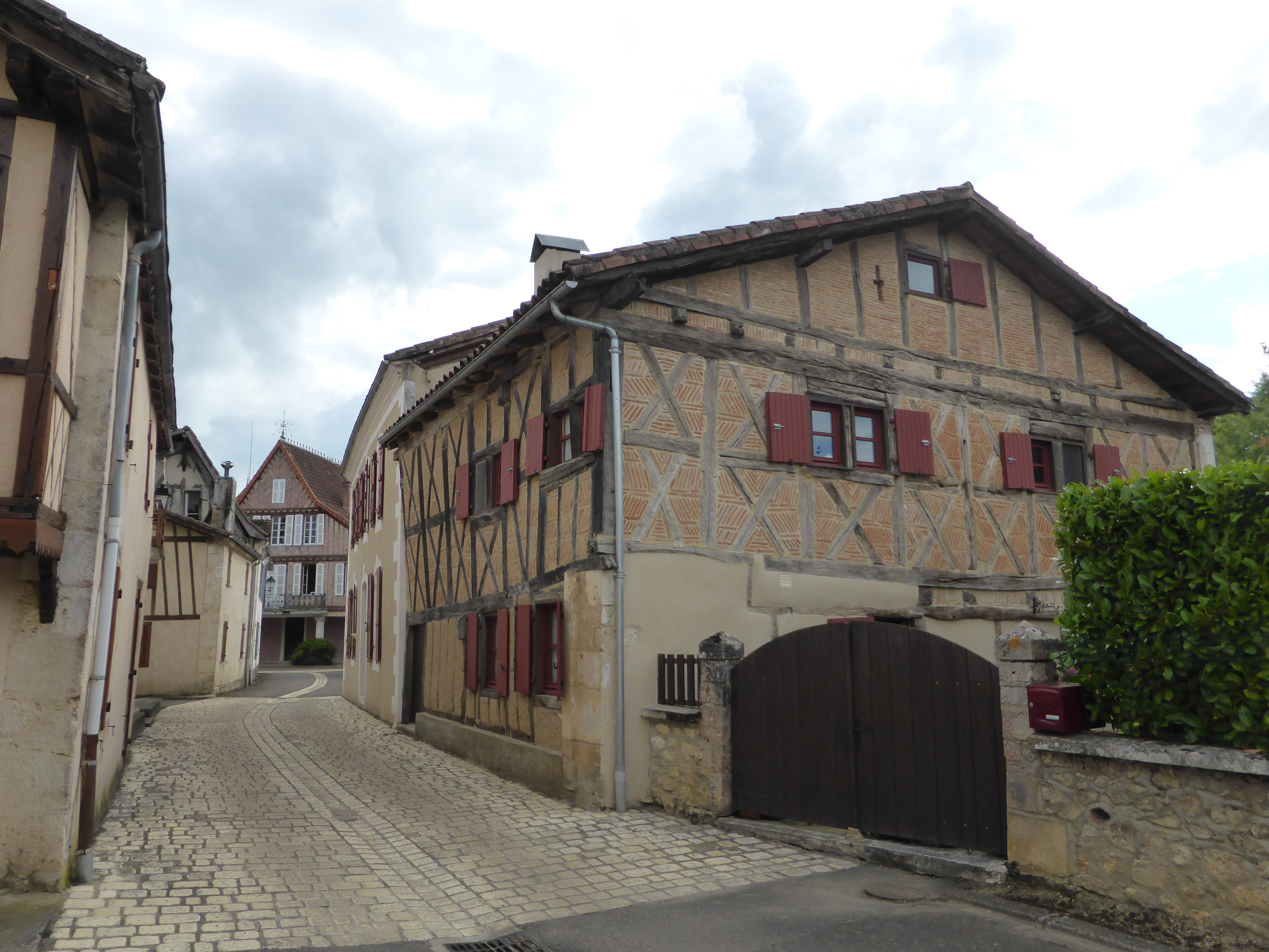 Rue du village de Mauvezin d'Armagnac, dans les Landes.